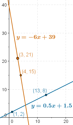 Наклон од формулата